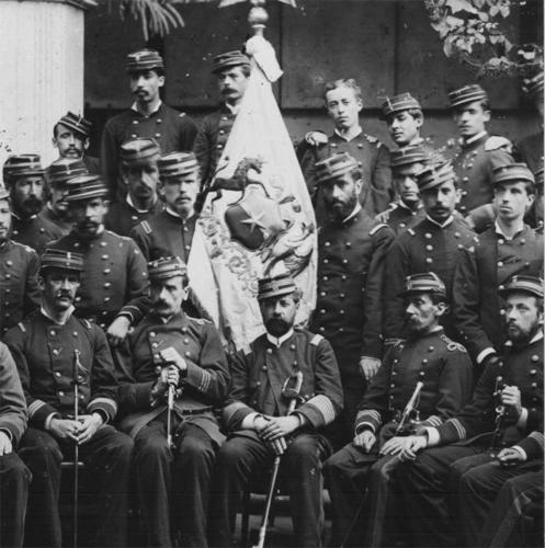 Oficiales chilenos durante la Guerra del Pacifico. Chorrillos, Perú. 1881